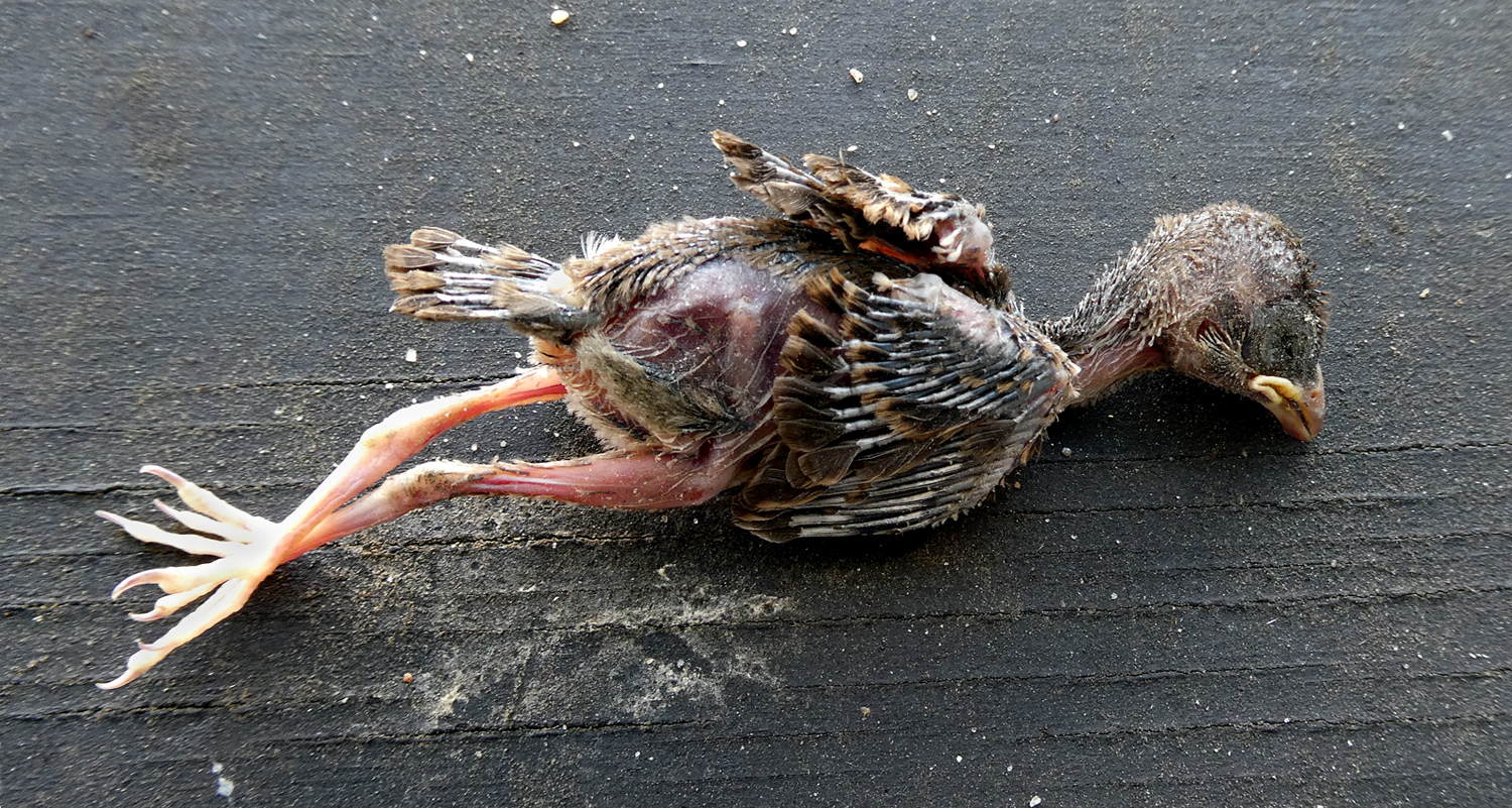 En död unge av Gråsparv, ca en vecka gammal.